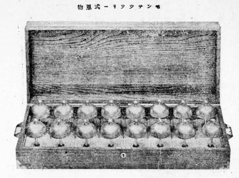 モンテッソーリ式恩物 小学校長団の観たる米国の教育 東京市教育会 編 (佐藤出版部, 1920)